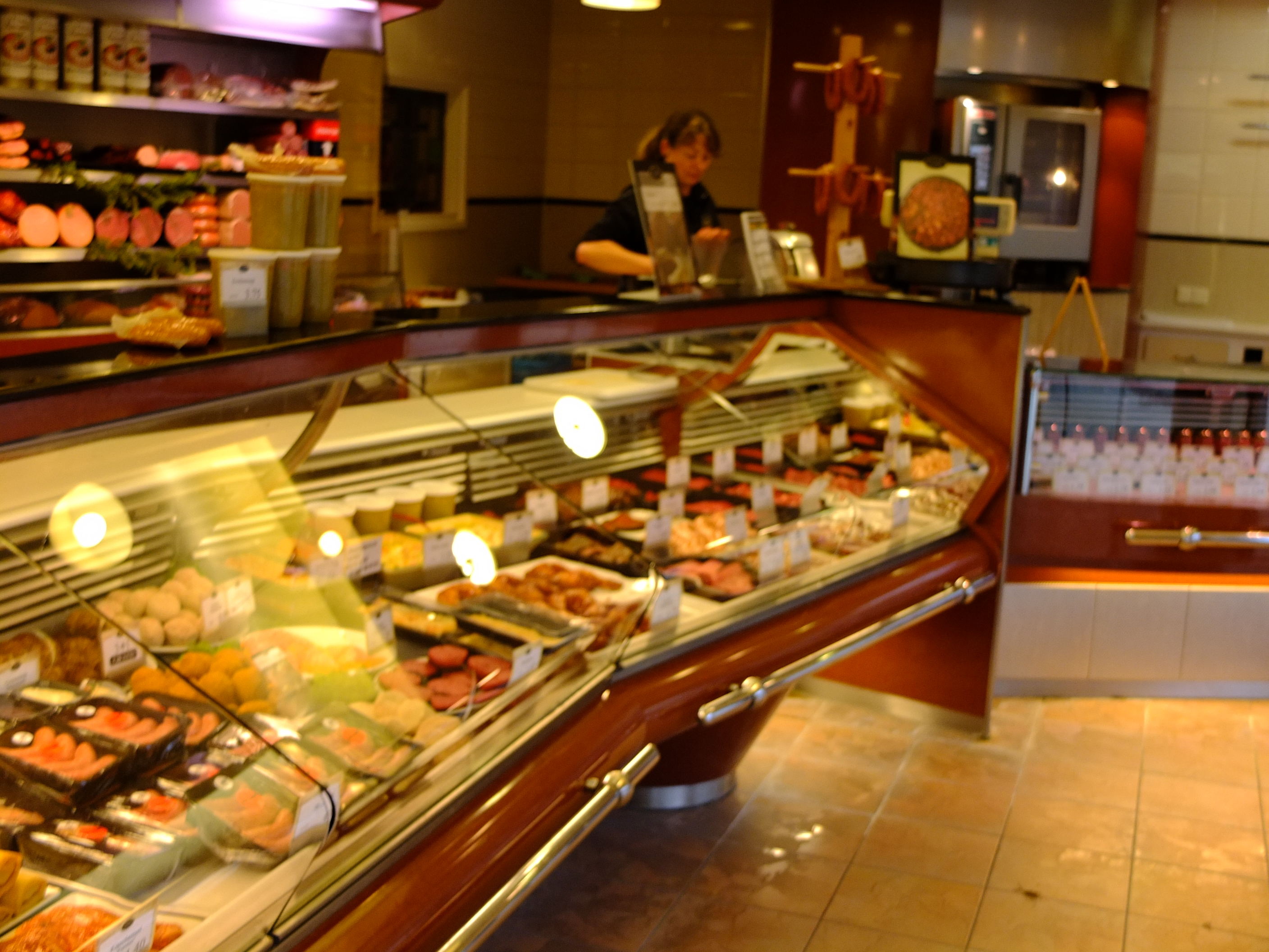 Slagerij Bart Vermeer Heksenwiel